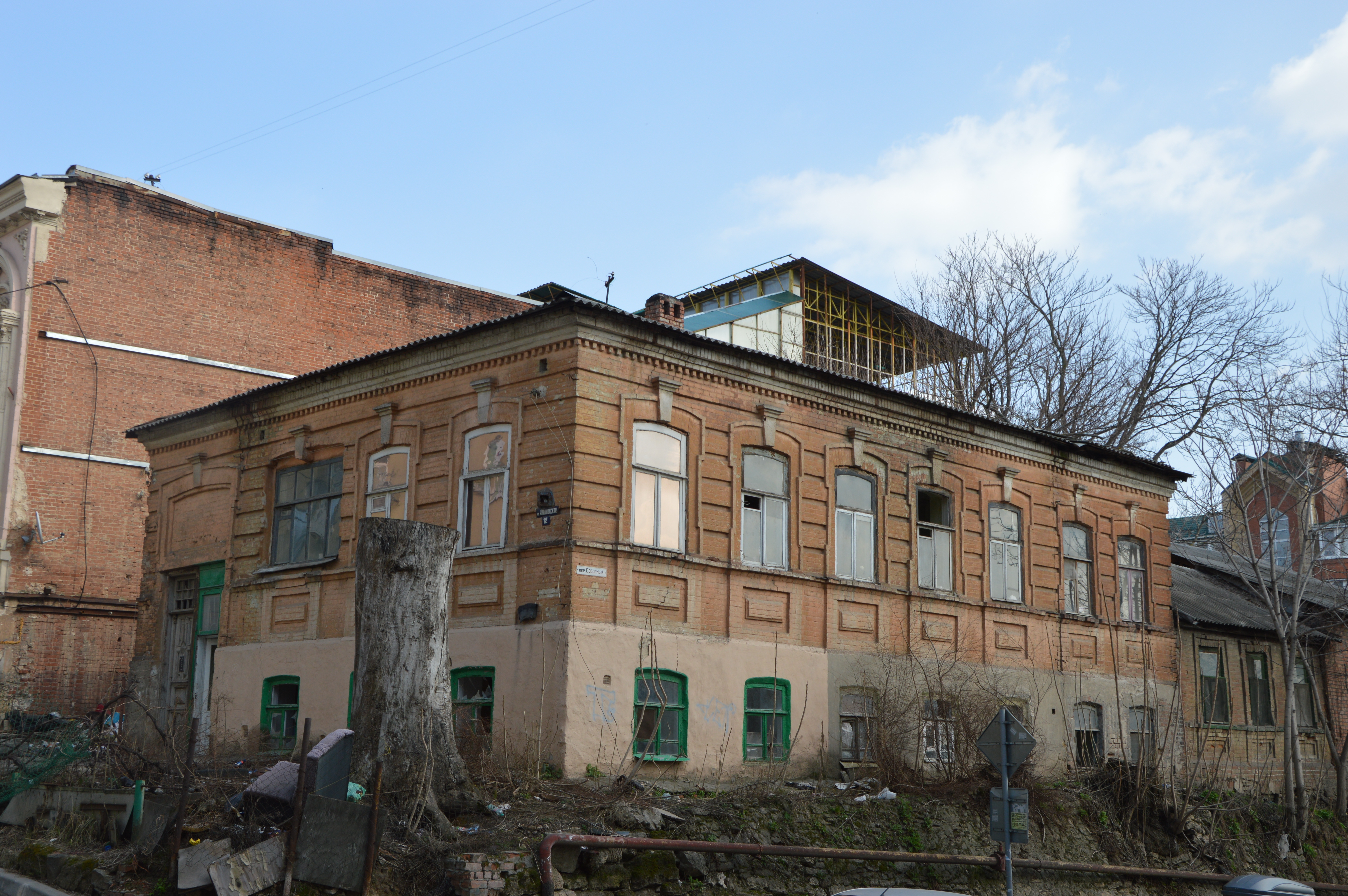 Здание города Ростова-на-Дону